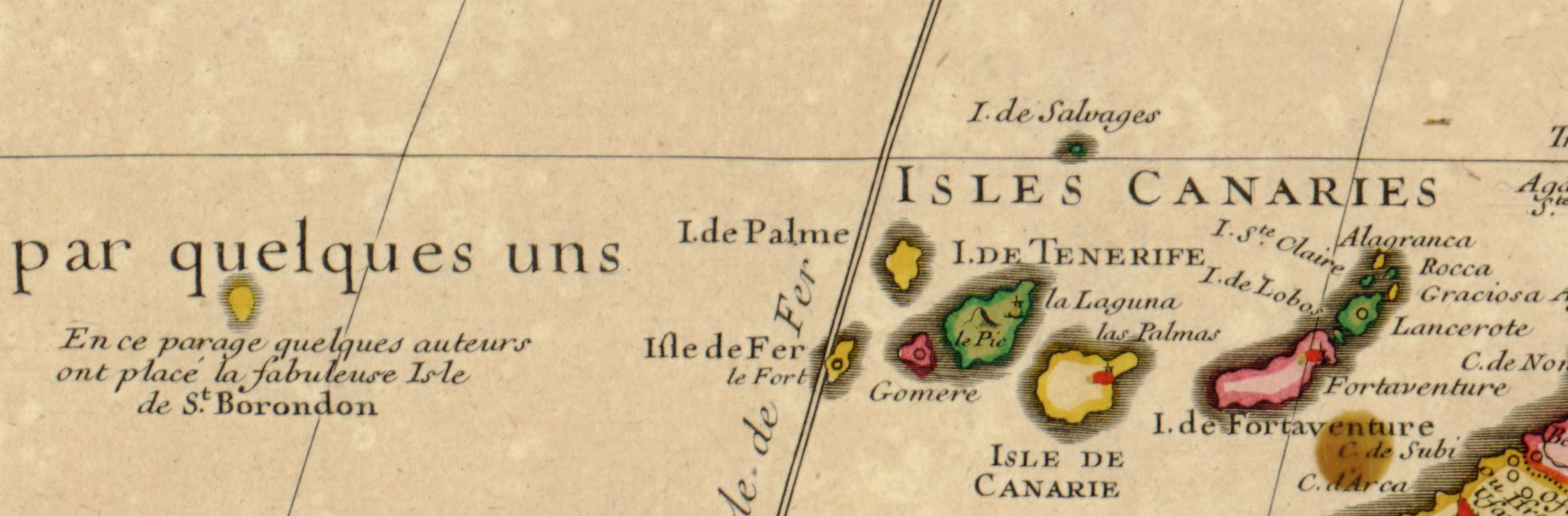 Die Phantominsel Sankt Brendan (St. Borondon) und die Kanarischen Inseln auf einer Karte von Guillaume Delisle, 1707